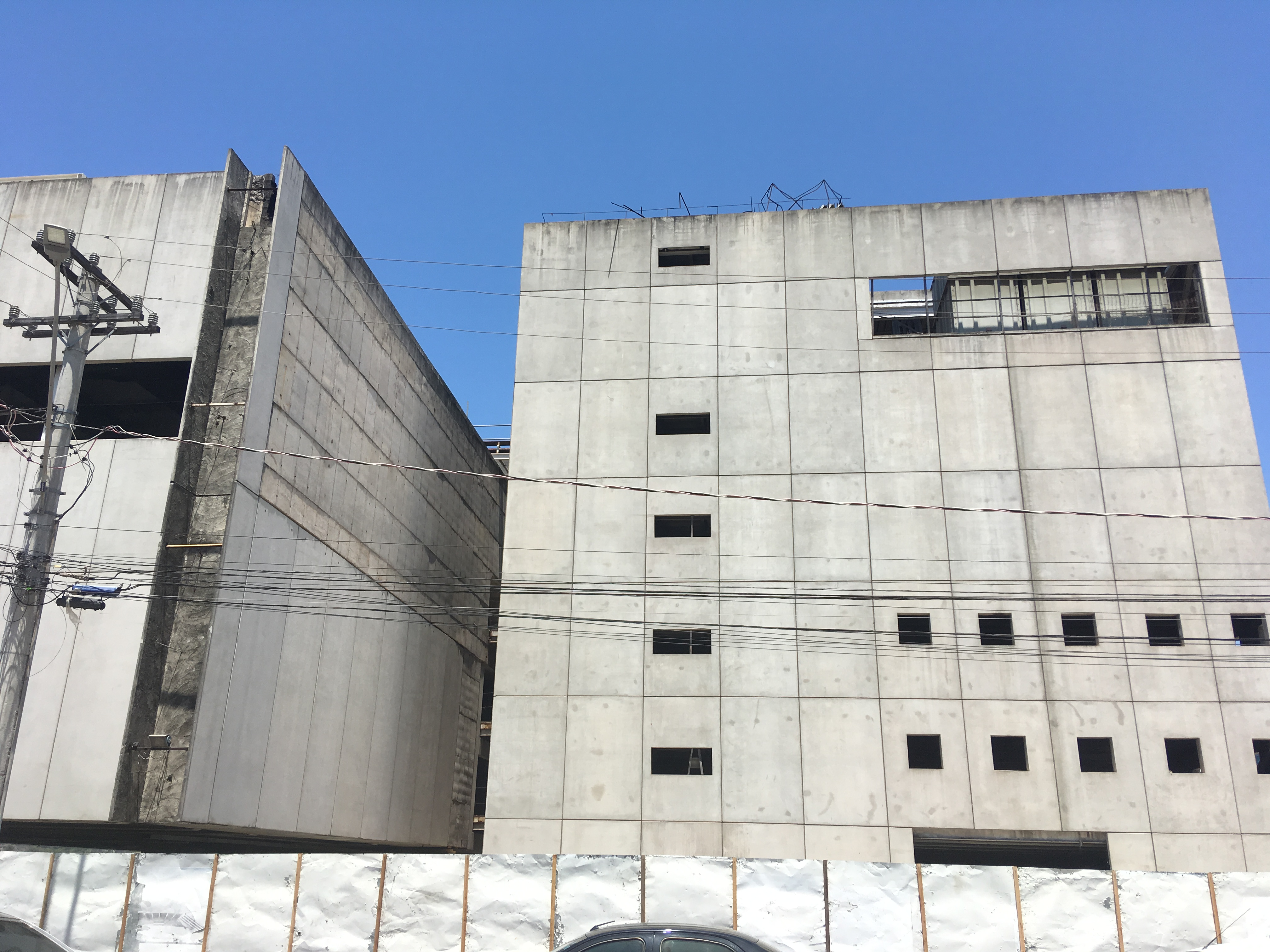 Paredes inacabadas.